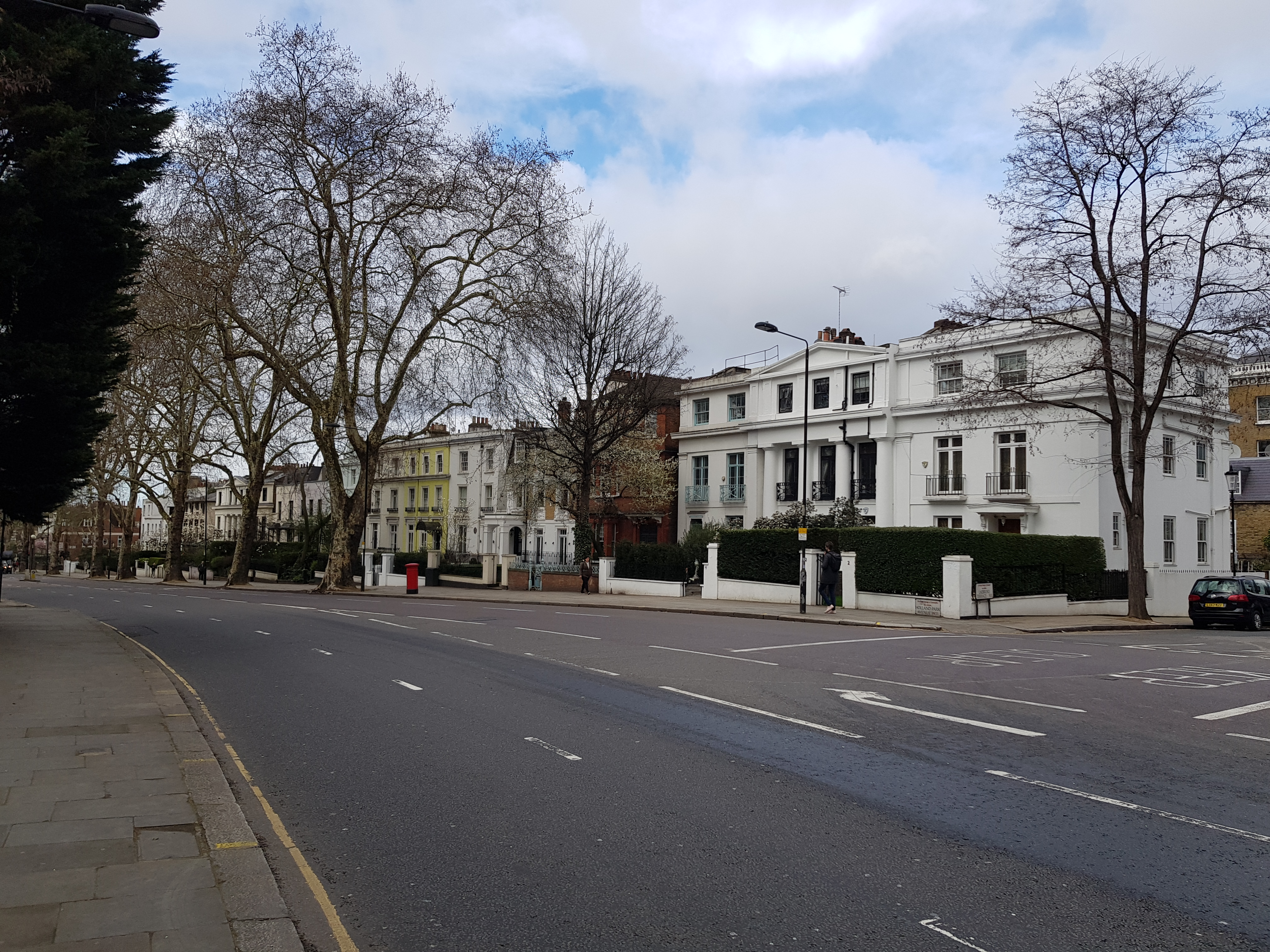 Holland Park Avenue, Londres, mars 2019.